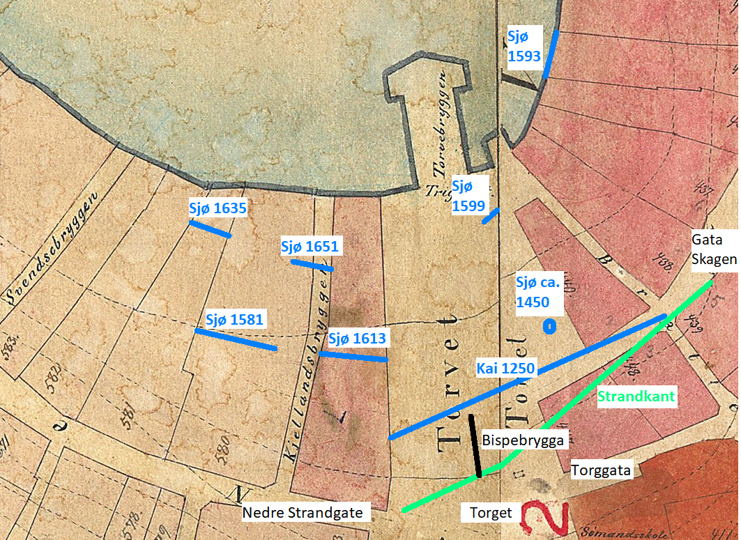 Historiske strandkanter, kaier og brygger på Torget i Stavanger